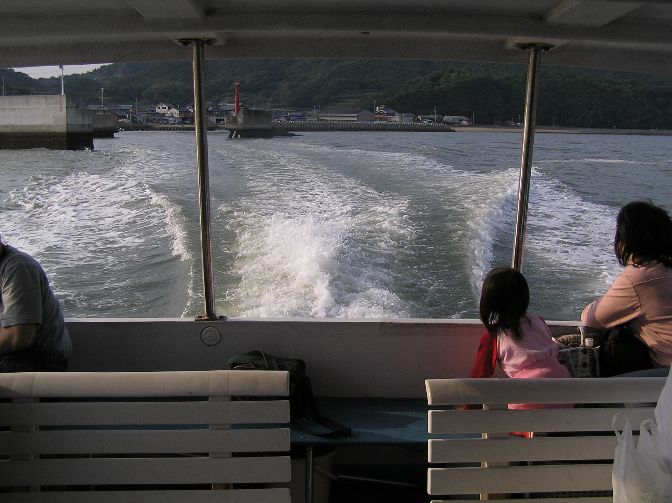 2004-05-22 Inujima,犬島